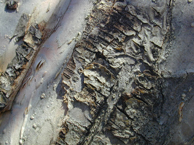 Tree bark